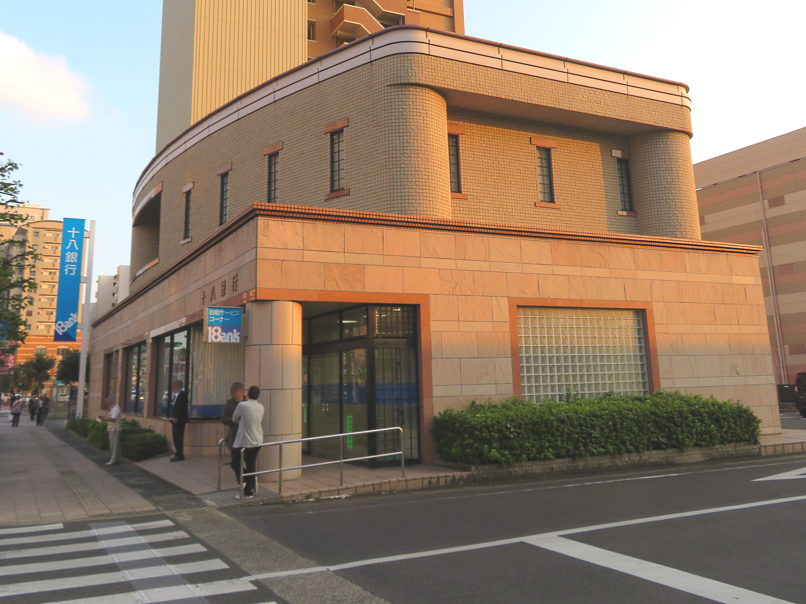 十八銀行佐世保駅前支店の建物